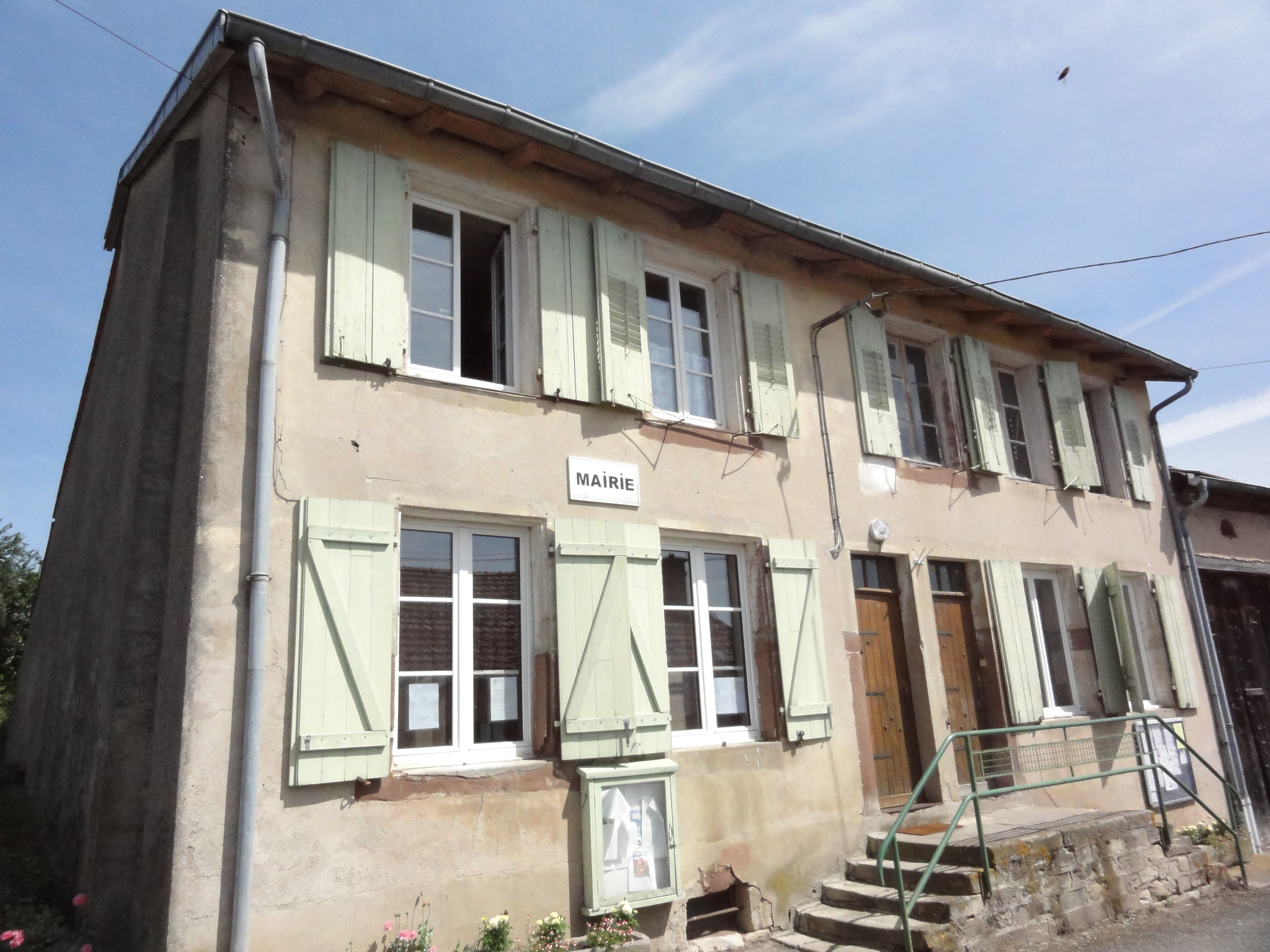 Assenoncourt (Moselle) mairie